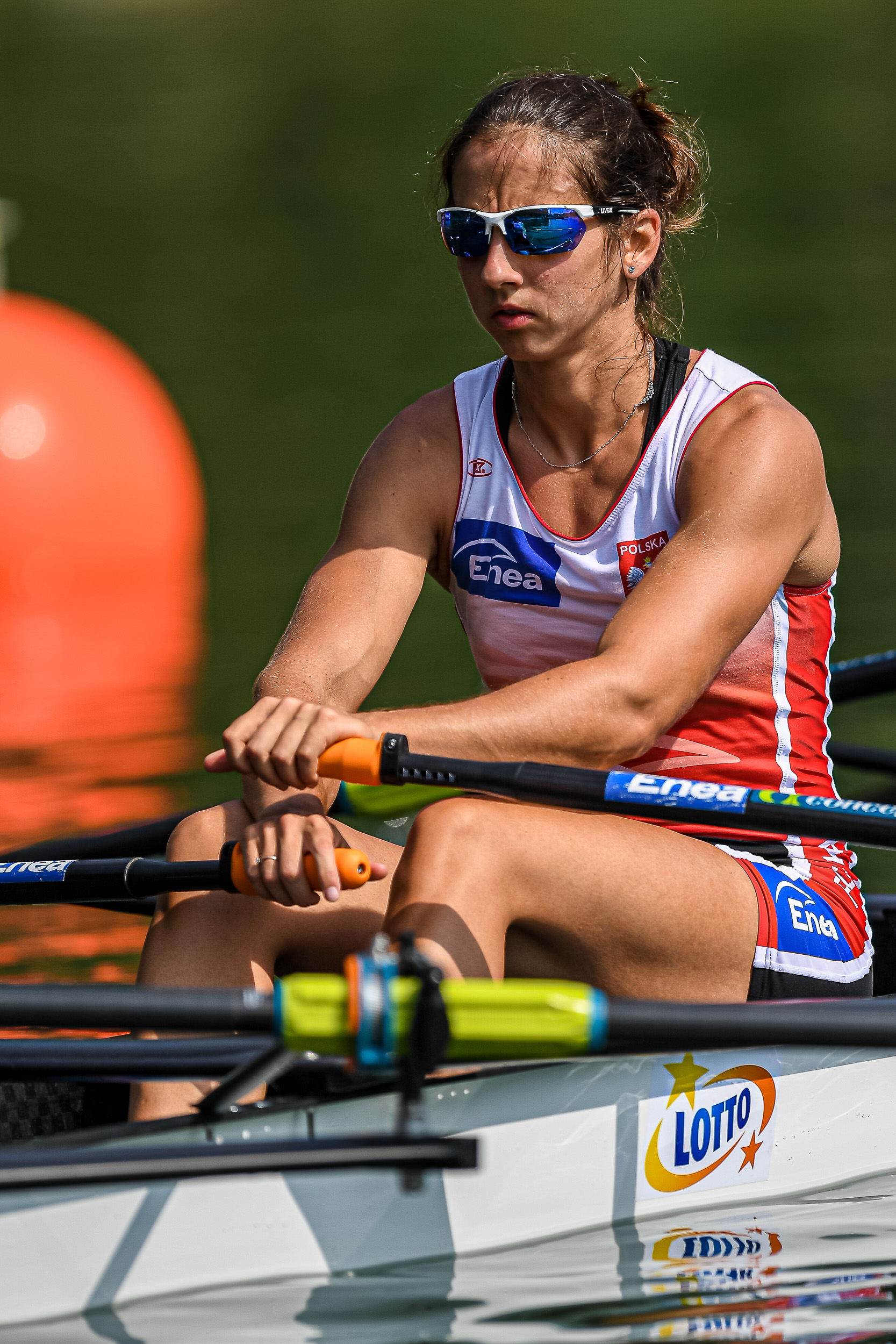 Polska wioślarka Maria Sajdak (z domu Springwald) na czwórce podwójnej na wodzie - 2019 rok